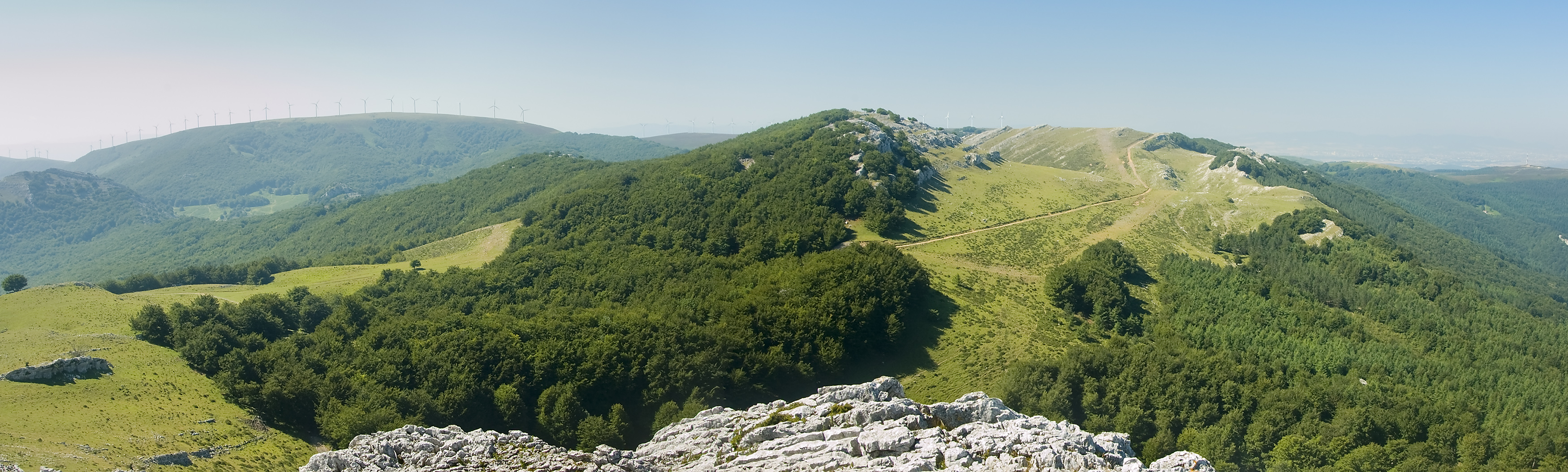 Zaraiako mendilerroa Elorretako Haitzetik hegoeldera ikusita. Lehenengo planoan Aranguren nabarmentzen da. You can contribute by translating this description into more languages.